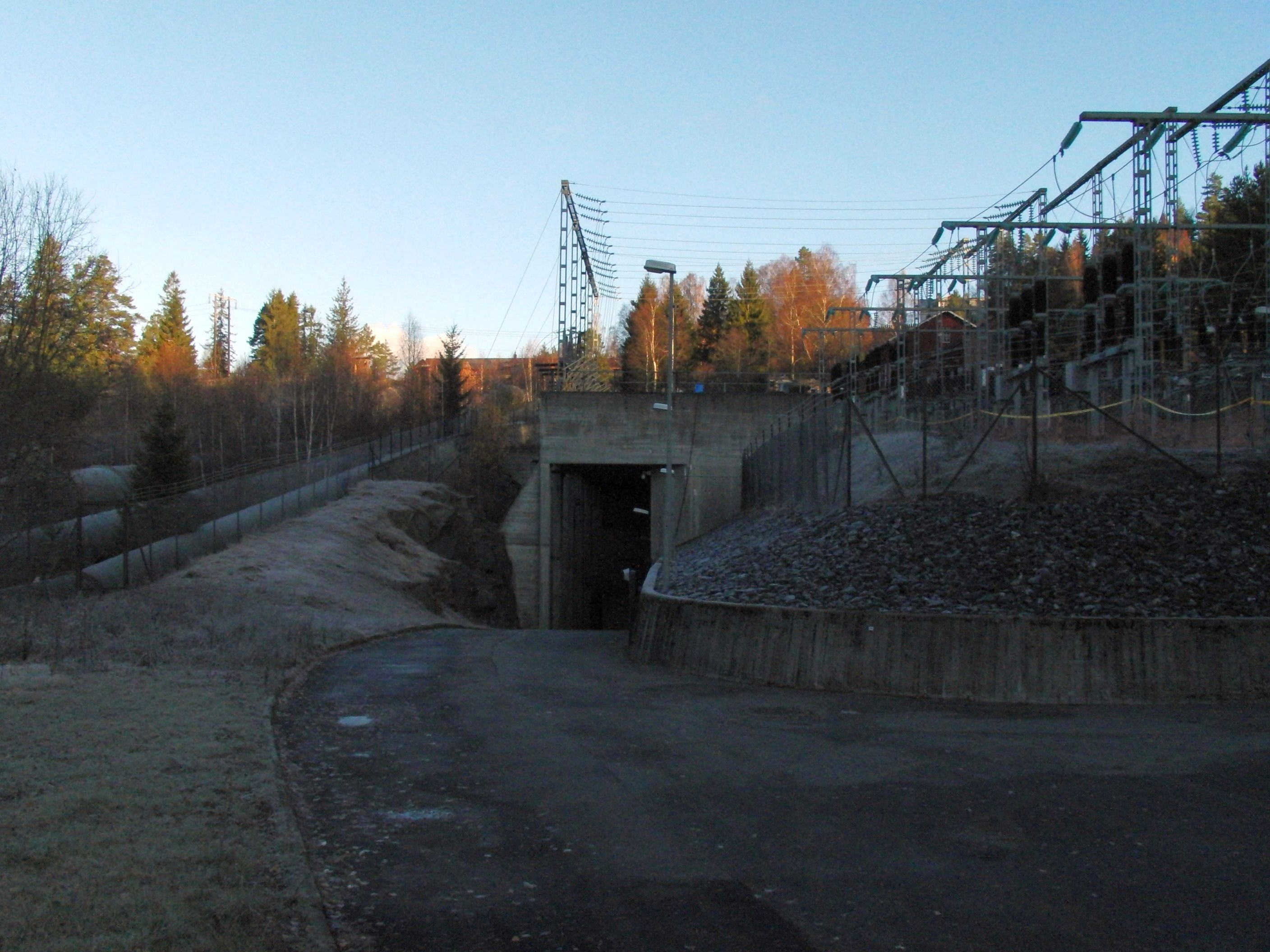 Skollenborg kraftverk